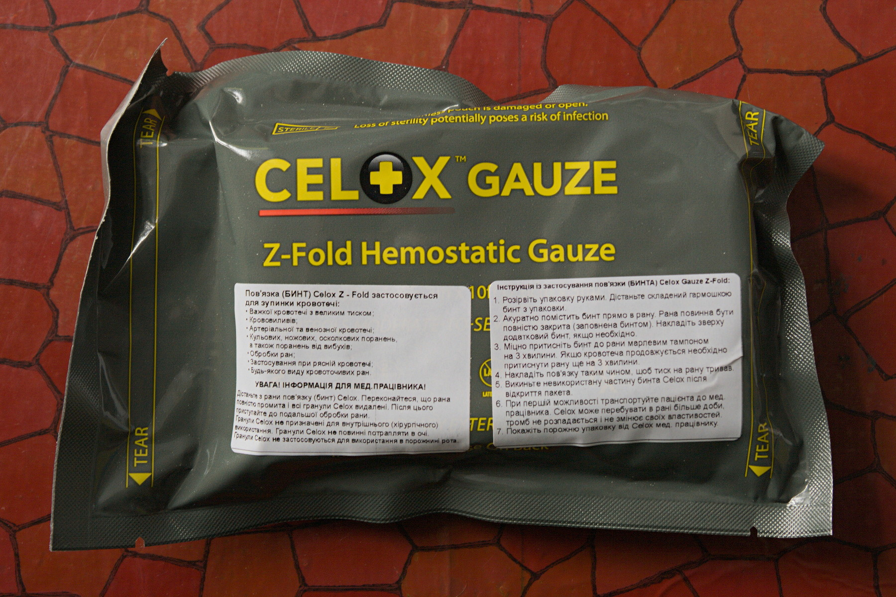 Кровоспинний препарат Celox з аптечки «Народного Тилу»